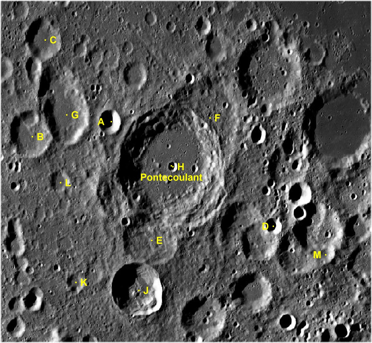 Cráter lunar Pontécoulant. Cráteres satélite. (Imagen LRO)